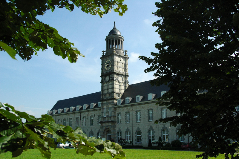 Sint Bernardusabdij, Hemiksem, Belgium